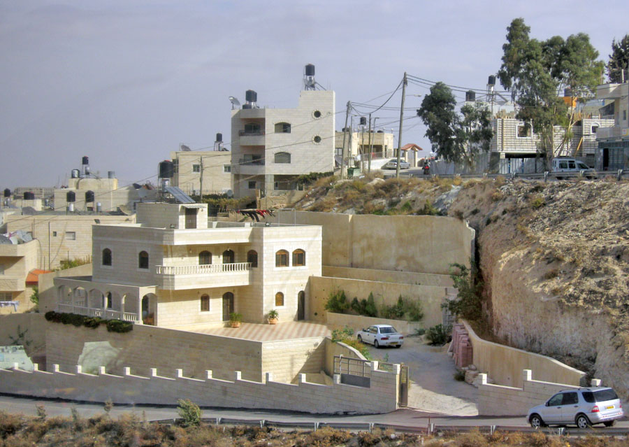 Jabbel mukkabar in Jerusalem